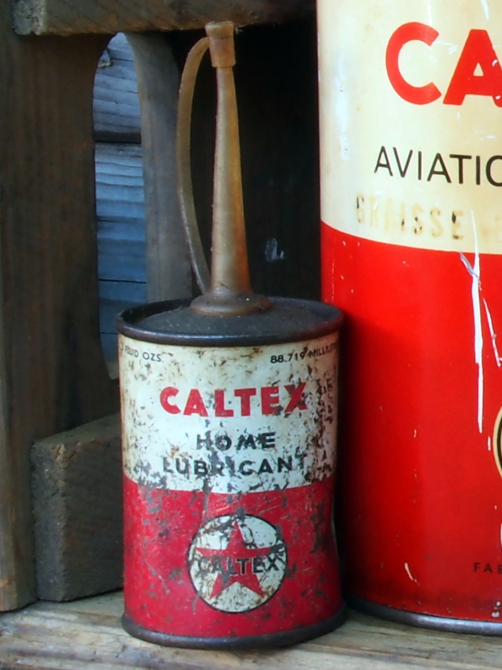 Caltex Home Lubricant.